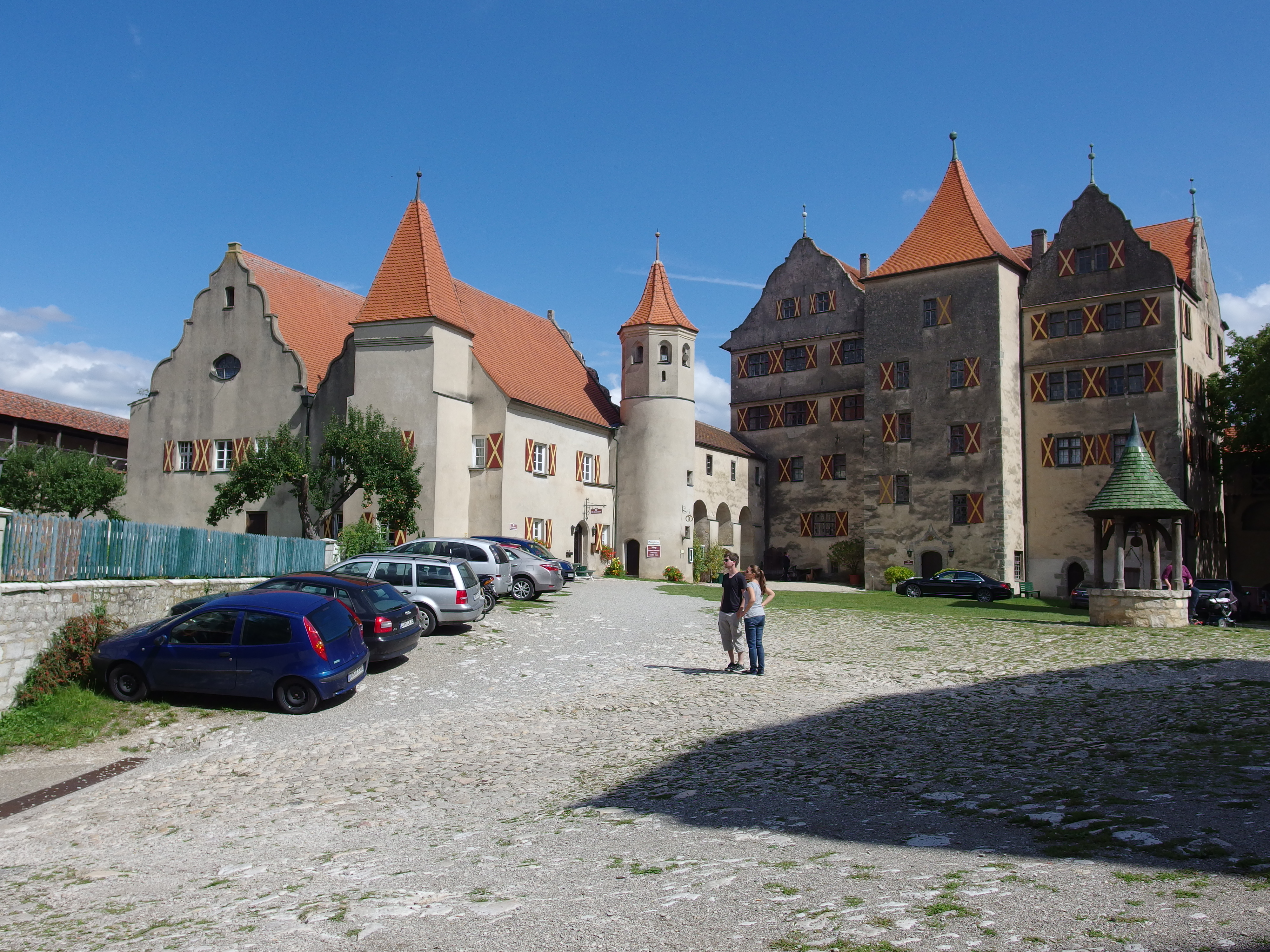 Harburg, Schloß Harburg, Fürstenhaus; links PfistereiThis is a photograph of an architectural monument.